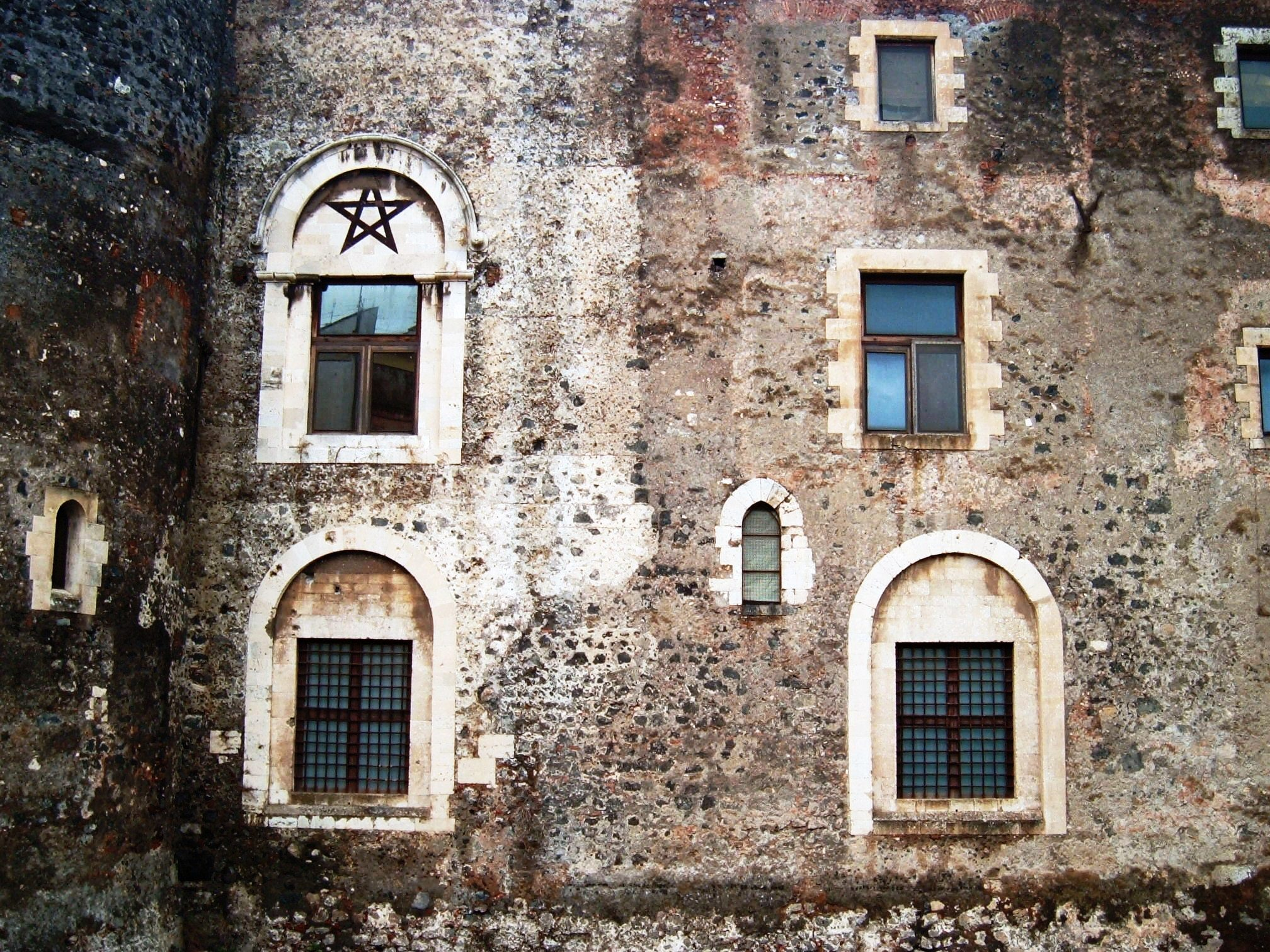 La stella a cinque punte su un fianco del Castello Ursino (Catania)